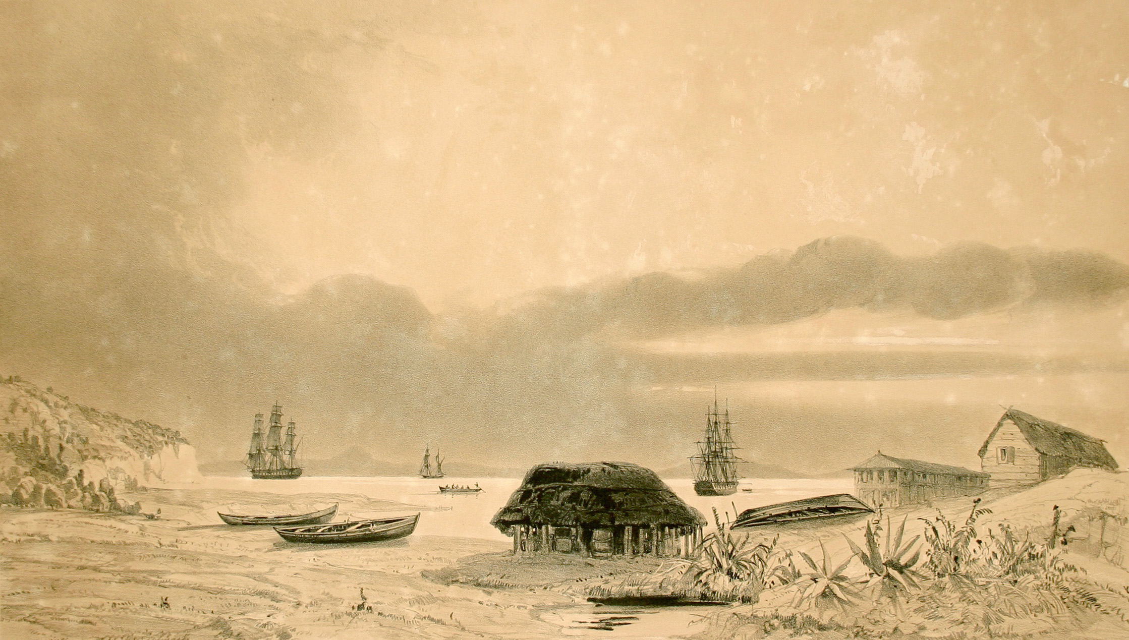 Établissement des baleiniers sur l'île Quiriquina. Atlas pittoresque, planche 32